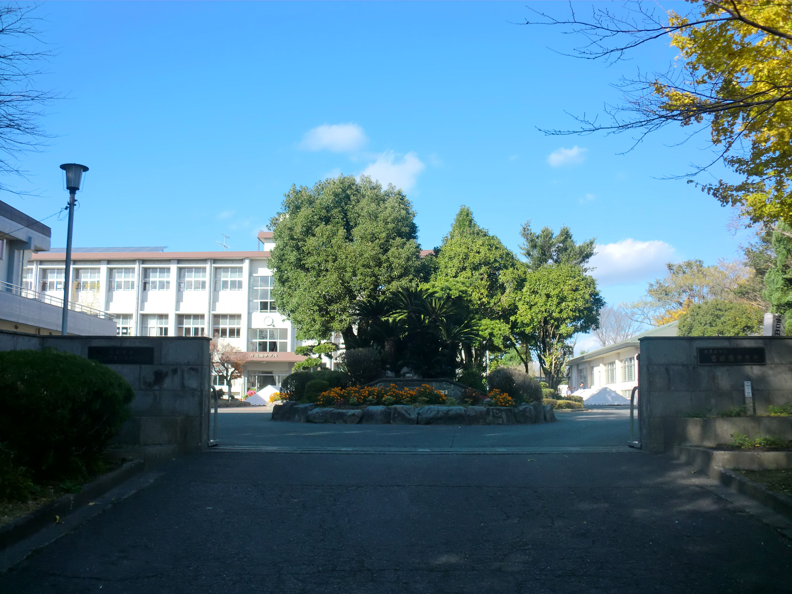 鹿児島市にある吉田南中学校